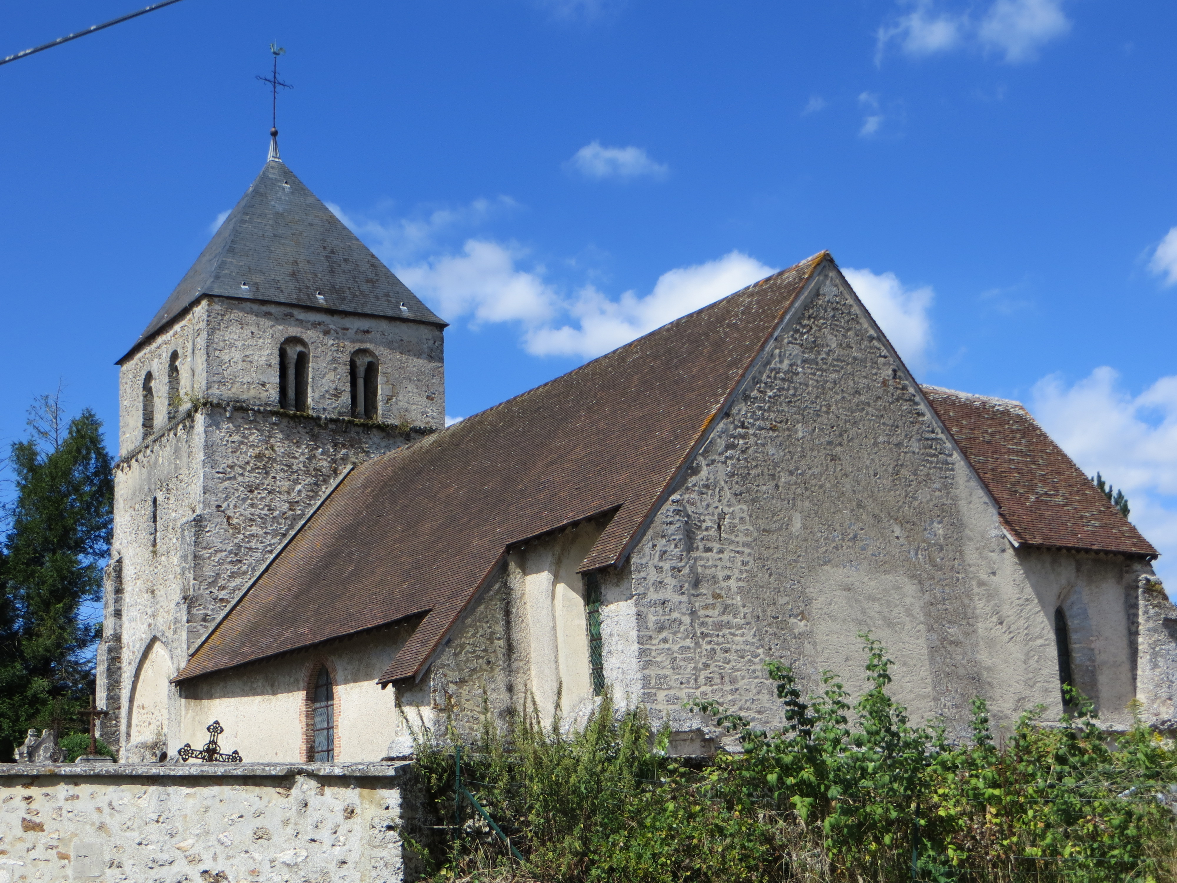 Vue générale de l'église, vue du chevet